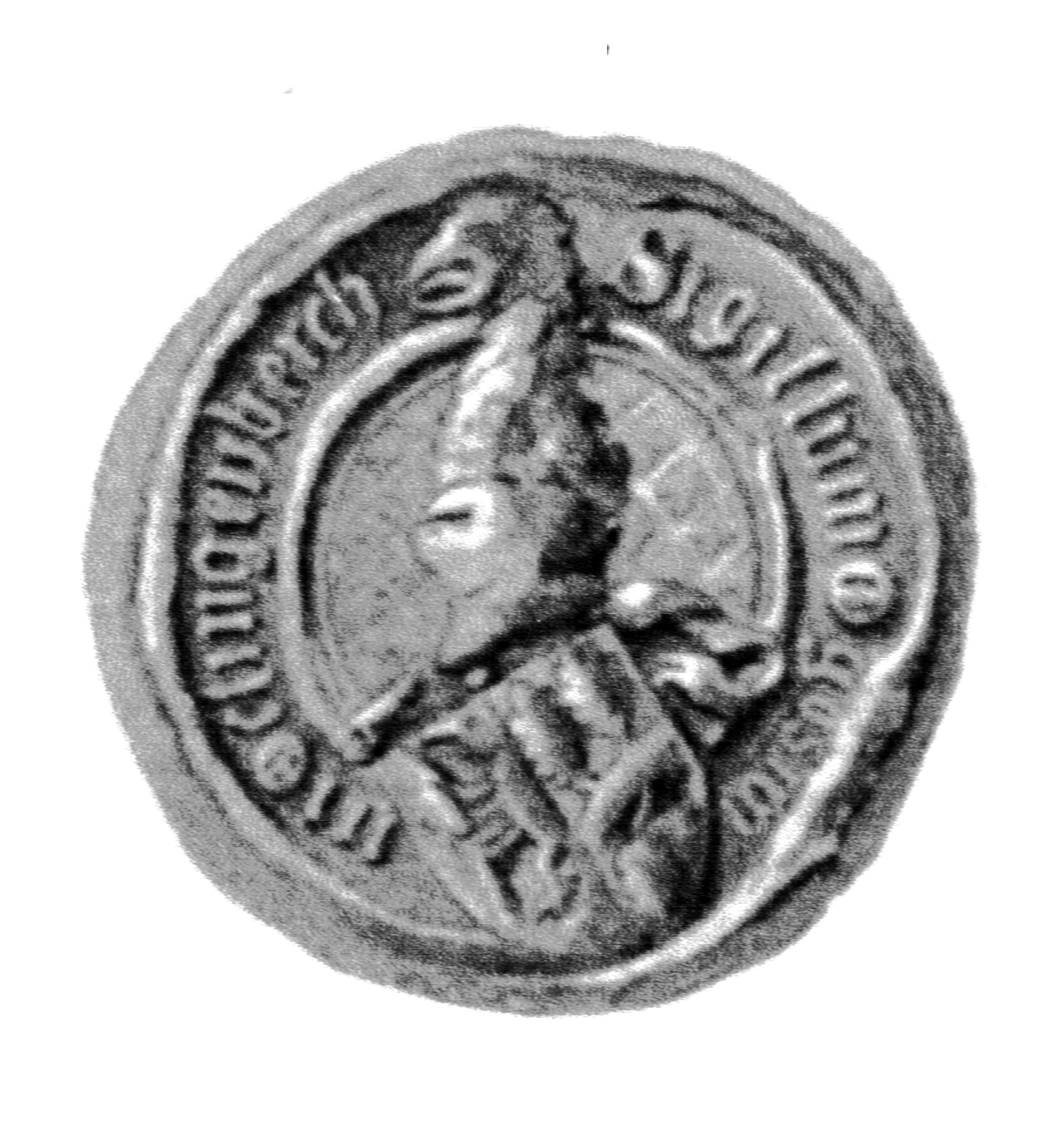 Siegel des Ratsmannes Coswin Klingenberg. Das Siegel stammt aus der Zeit um 1408. Siehe Emil Ferdinand Fehling: Lübeckische Ratslinie, Nr. 414 (Goswin Klingenberg, BM).